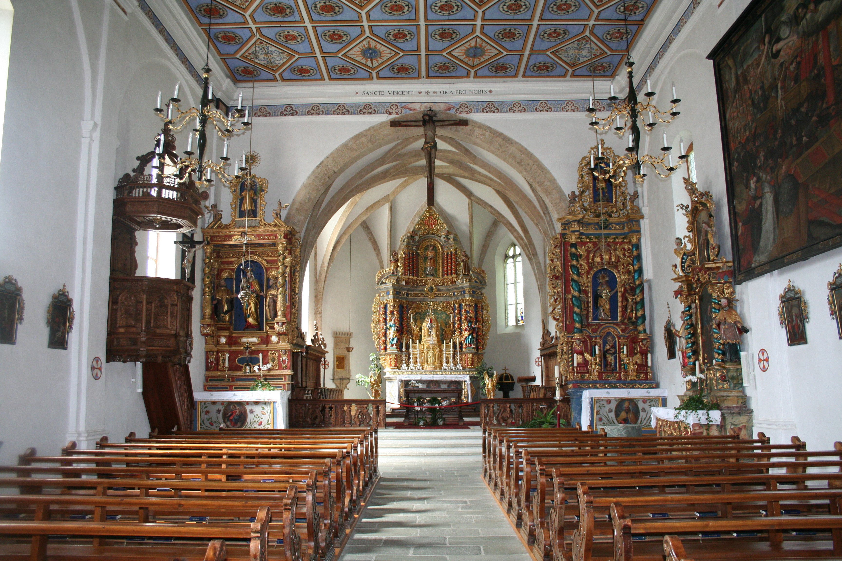 Katholische Kirche Pleif: Innen